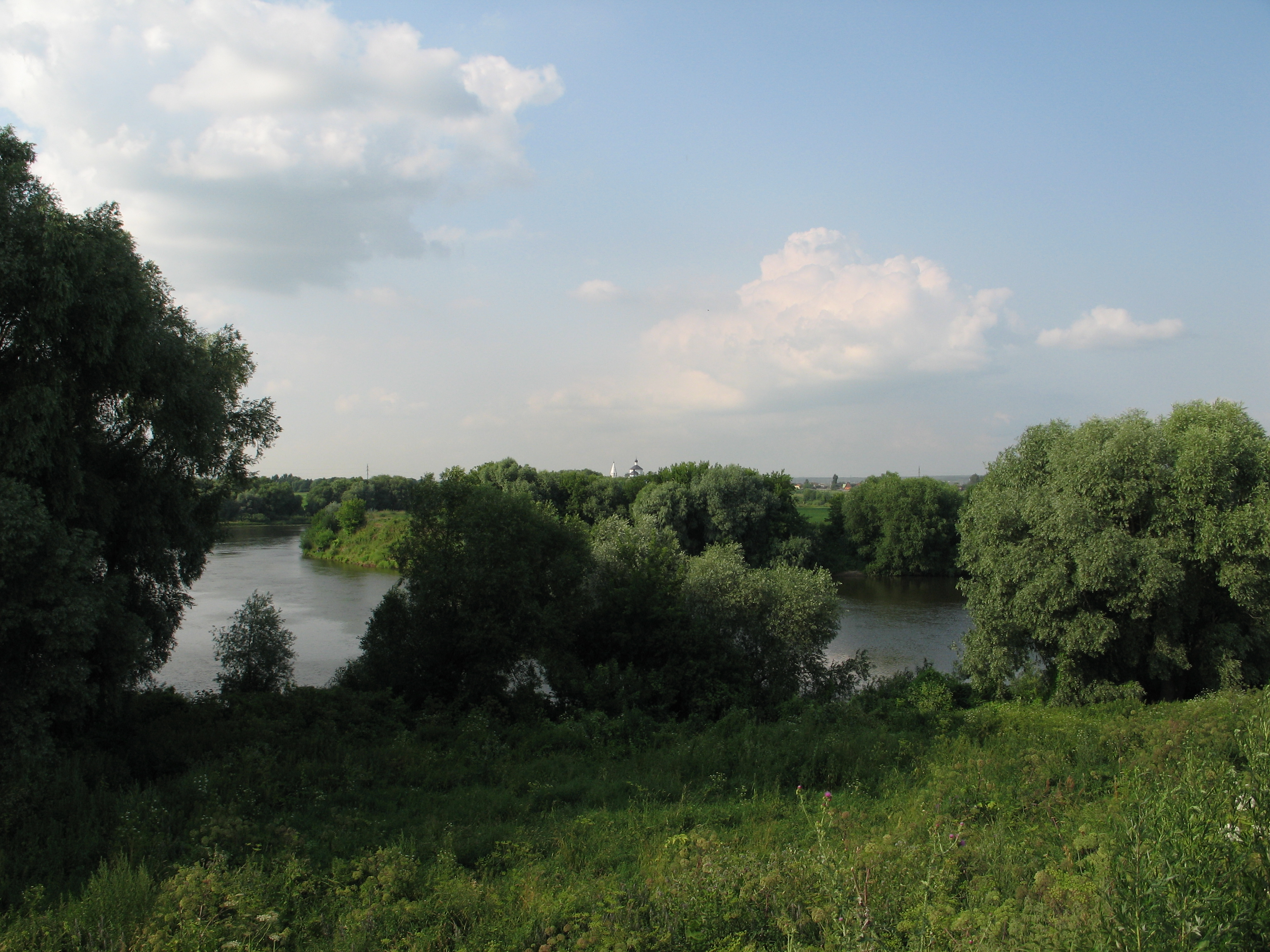 Moscow river near Kolomna Излучина Москва-реки в черте города Коломны. Лето 2006 года. На заднем плане Бобренев монастырь